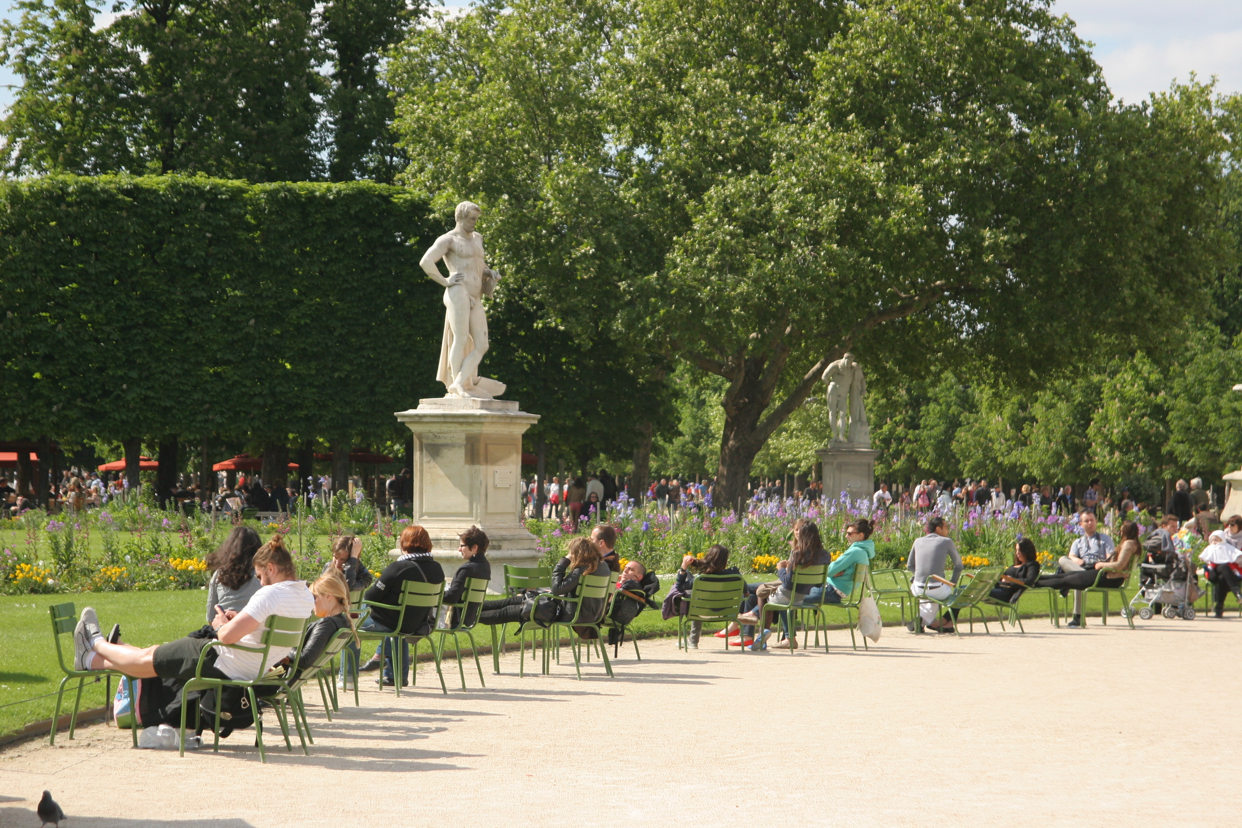 Париж, Франция. Май 2012 Paris, France. May 2012